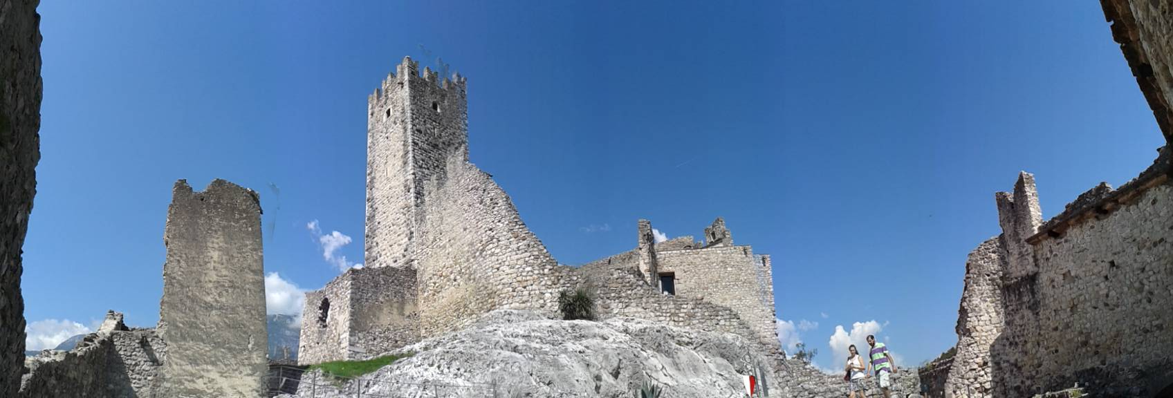 Castello di Drena